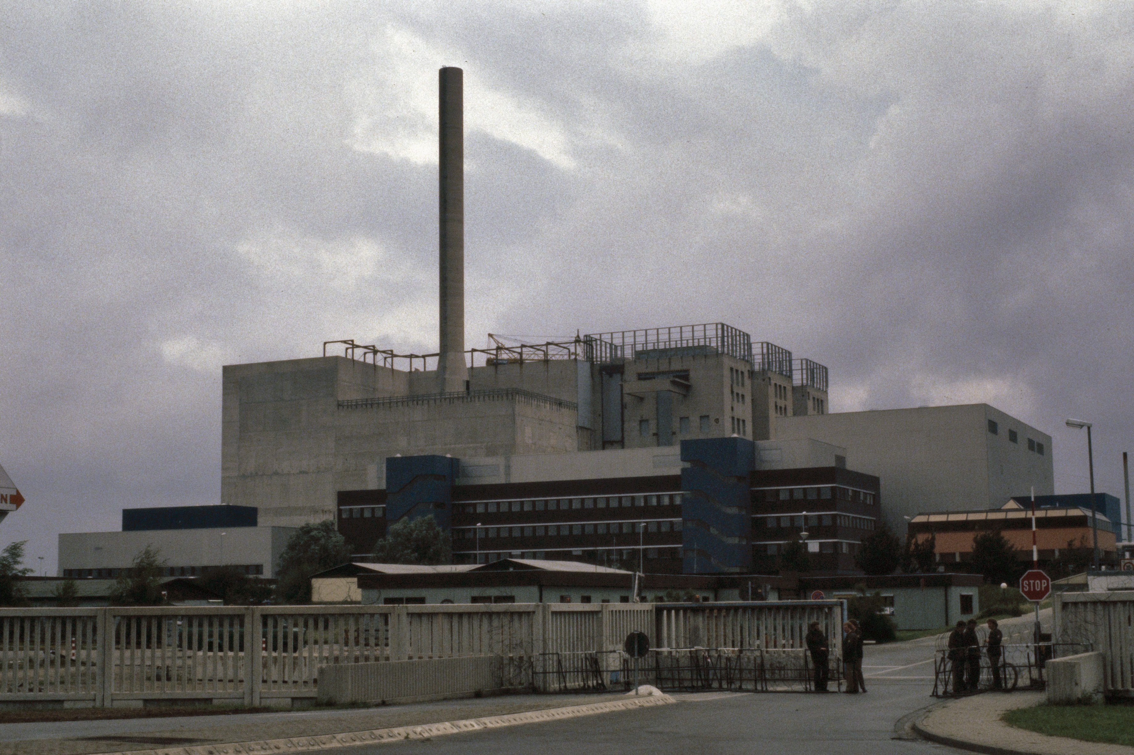 Kernkraftwerk Kalkar.